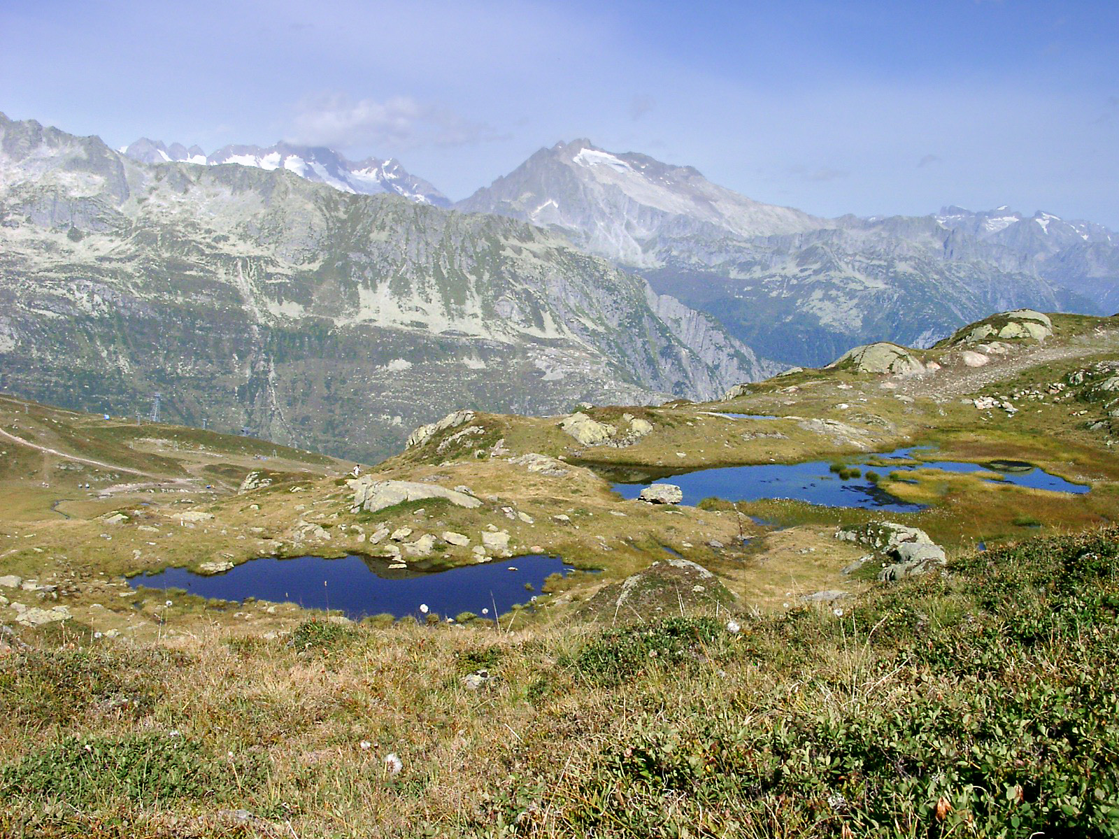 Blick auf die schönen Luterseeli (2283 m.ü.M.) unterhalb des Gemsstock im Schweizer Kanton Uri.